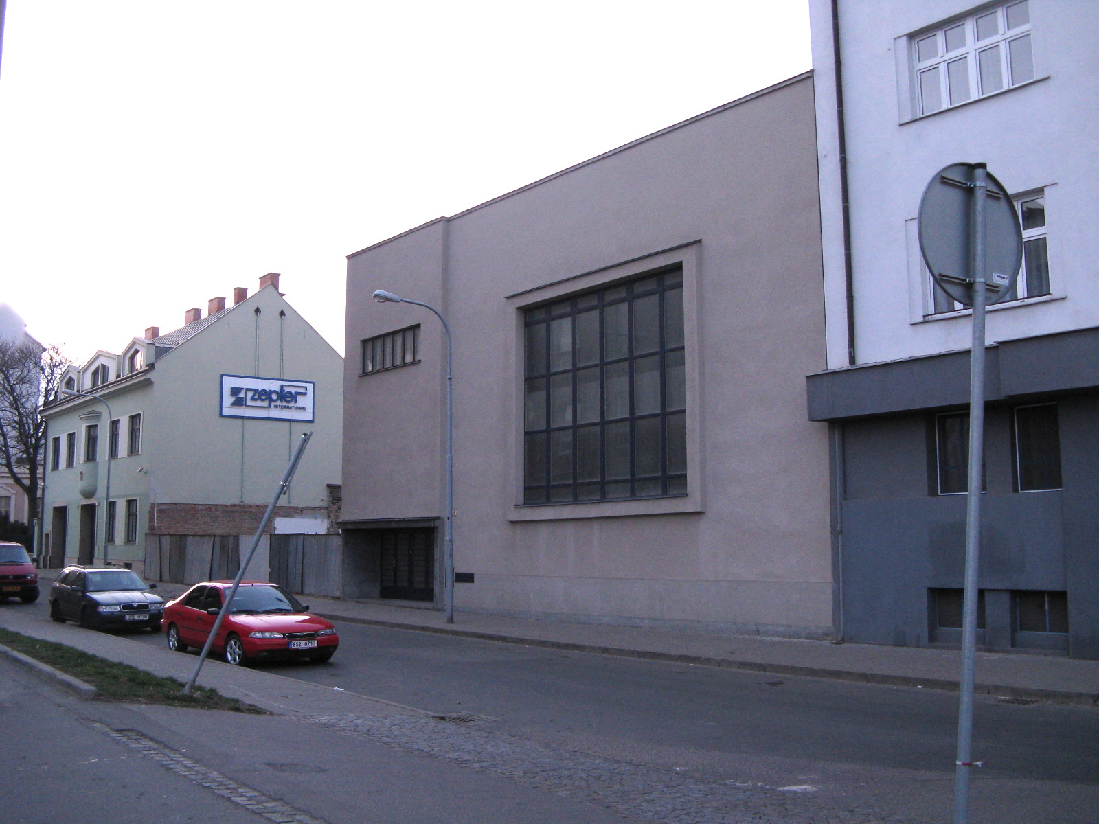 synagogue, Brno, Skořepka Street